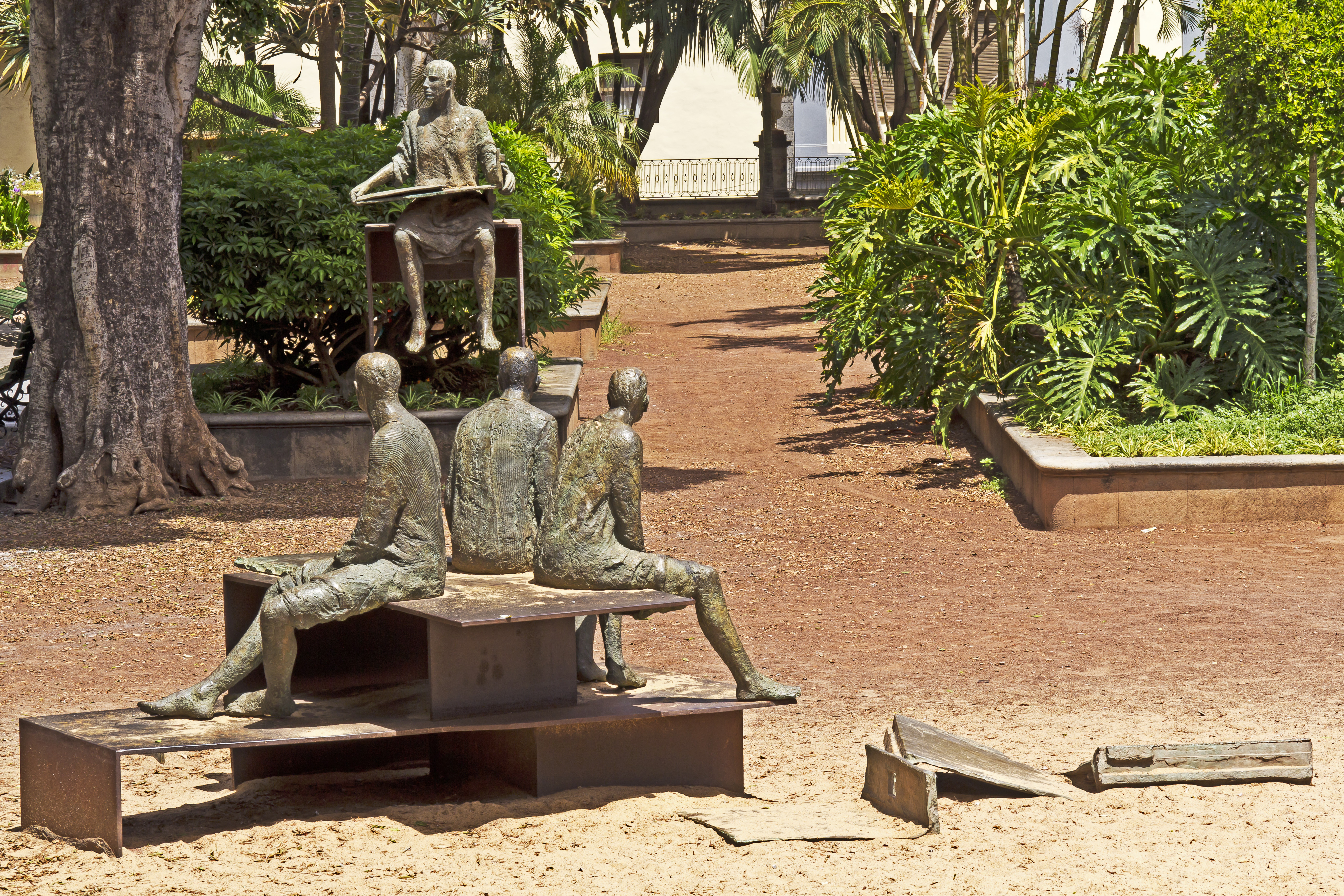 Die Plastik „Courage“ wurde von der in Maastricht (Niederlande) geborenen Künstlerin Hanneke Beaumont geschaffen. Das Ensemble wurde 1995 im Rahmen der Initiative „Escultura en la Calle“ der Architektenkammer der Kanarischen Inseln auf der Plaza del Príncipe de Asturias aufgestellt.